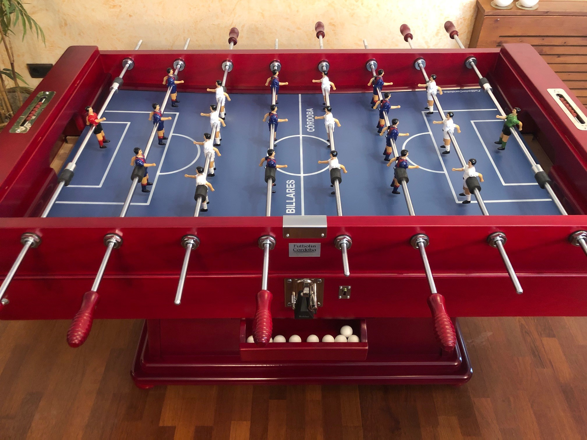 Auténtico Futbolín Córdoba de la marca Billares Córdoba. Fabricado en madera maciza de haya, componentes de acero inoxidable cromado y jugadores de piernas separadas. Más de 70 años de historia.